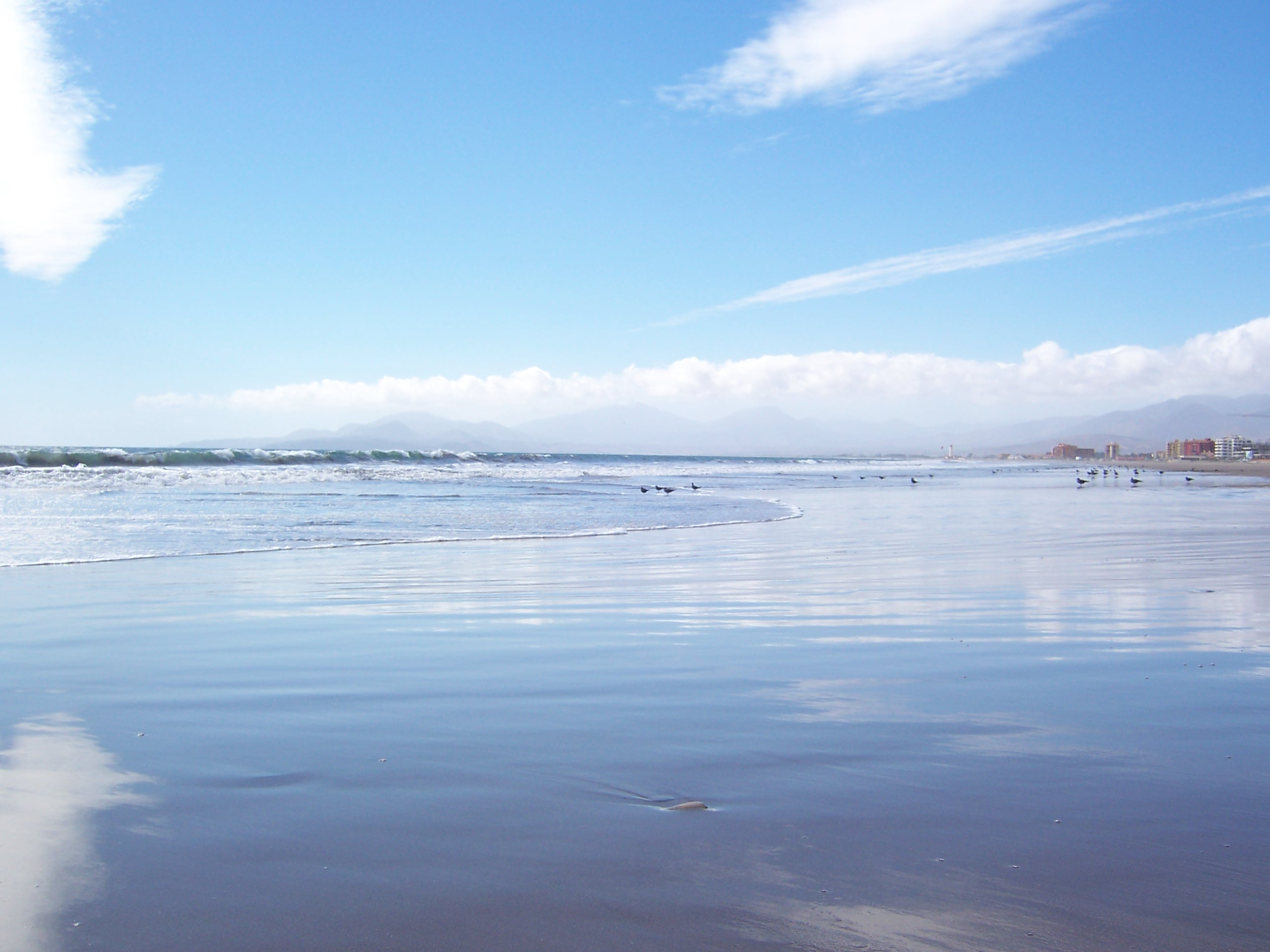 beach La Serena